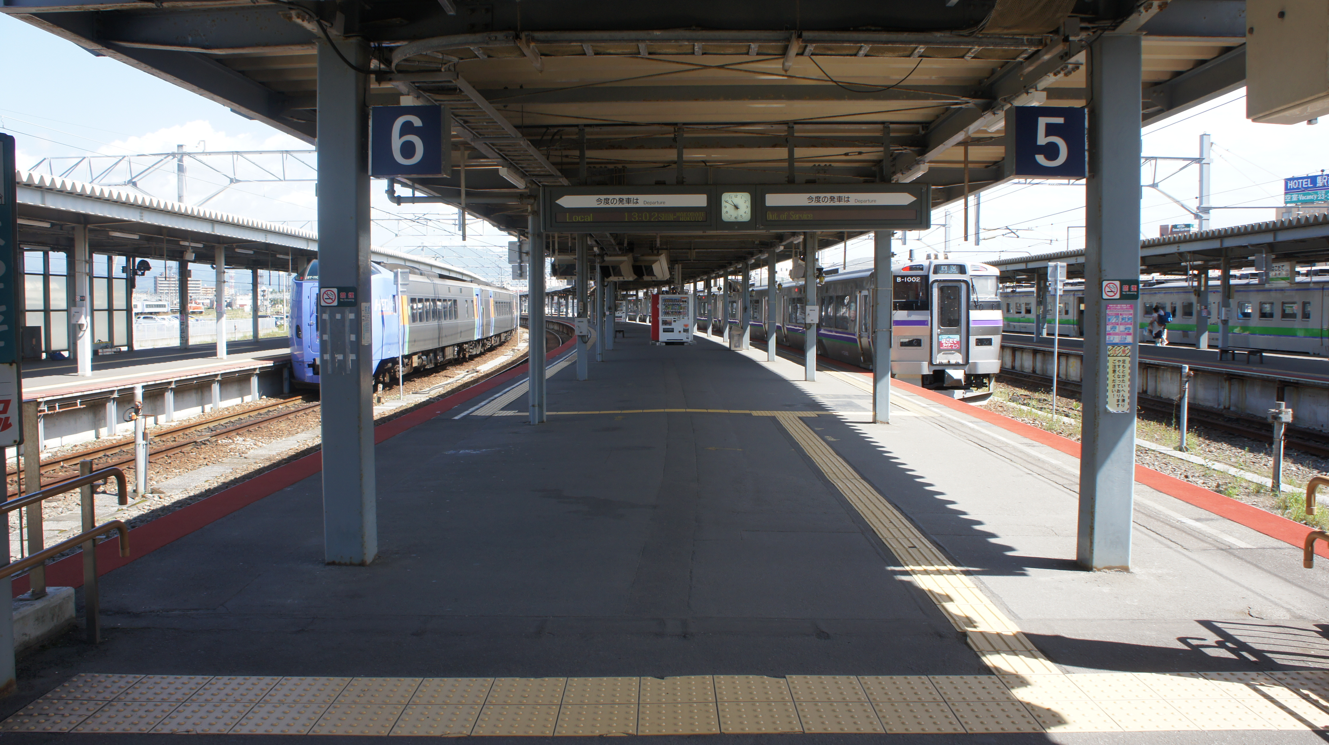 JR函館本線・函館駅の5・6番線ホーム Sony NEX-3